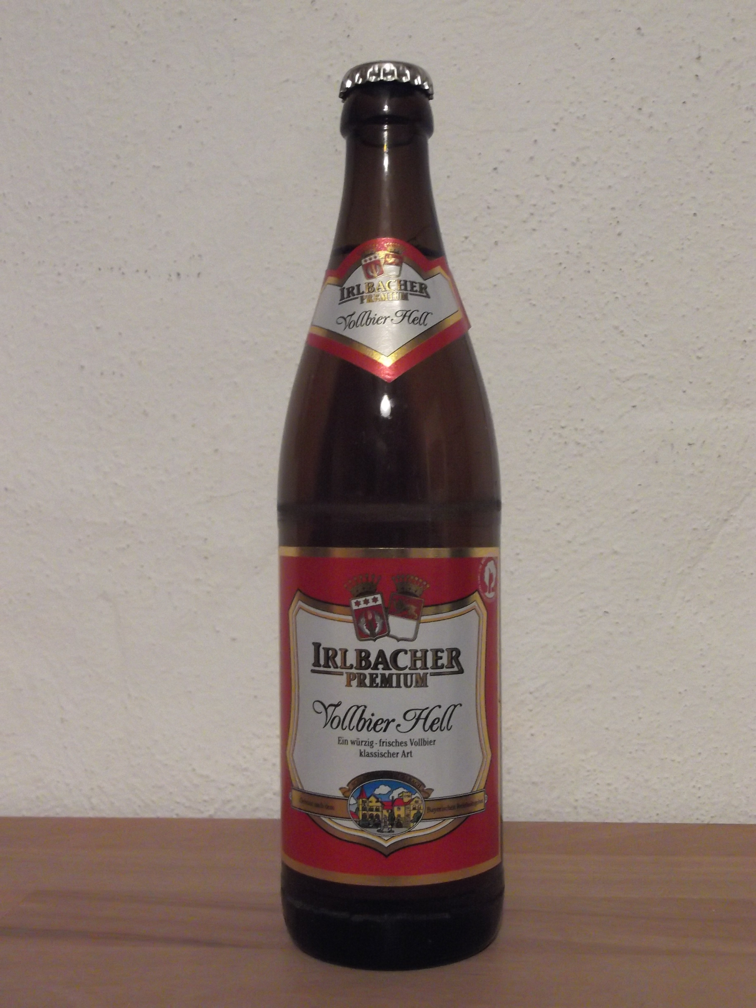 Flaschenabfüllung 0,5l